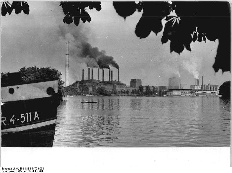 Berlin, Kraftwerk Klingenberg Zentralbild Krisch Kr-At. 5.7.61 Berliner Industrieviertel. Blick auf das Kraftwerk Klingenberg von der Stralauer Halbinsel aus. Majestätisch ragt der erste neue Schornstein des Kraftwerkes über seine kleineren Brüder. (Aufnahme: Juli 1961)